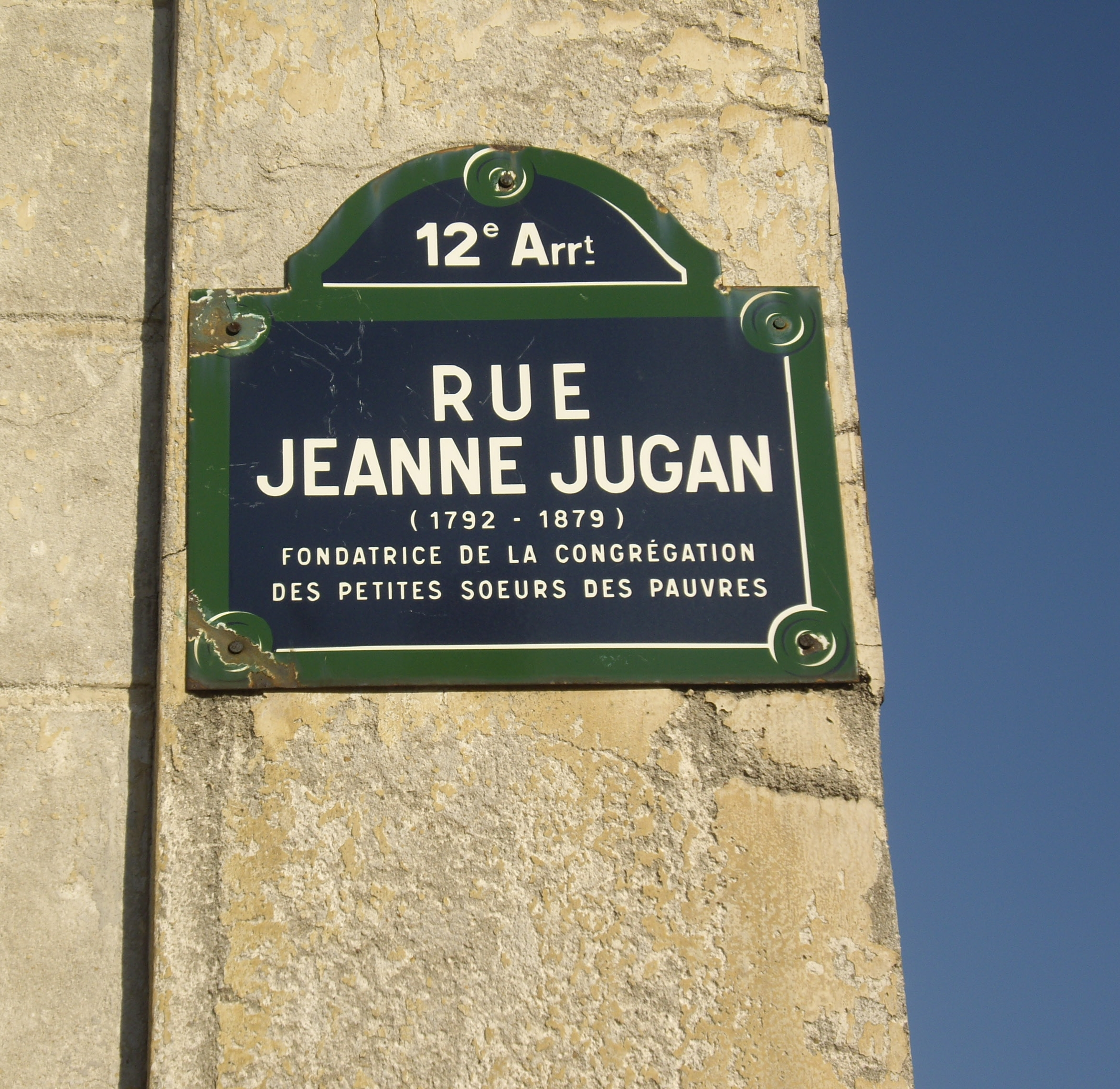 Rue Jeanne-Jugan, Paris 12e. « Jeanne Jugan, 1792-1879, fondatrice de la congrégation des Petites Sœurs des Pauvres. »